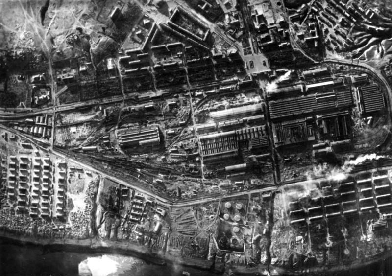 Sowjetunion, Luftaufnahme Stalingrad Die Panzer-Großfabrik Dserschinski Eine der bedeutendsten Verteidigungsanlagen der Sowjets im heißumkämpften Stalingrad war das Traktorenwerk Dserschinski, das schon im Frieden mit die besten Sowjetpanzer produzierte und seit Kriegsbeginn vollständig auf den Panzerkampfwagenbau umgestellt wurde. Das Werk war während des Kampfes um Stalingrad zu einer gewaltigen Bastion umgestaltet worden und wurde von den Bolschewisten mit größter Verzweiflung verteidigt. Nun ist es im Verlaufe eines erbitterten Ringens von den deutschen Truppen erobert worden.- Unsere Luftaufnahme, die bereits vor längerer Zeit von unseren Aufklärern gemacht wurde, zeigt einen Überblick über die gewaltige Anlage der Panzer-Großfabrik Dserschinski. PK-Luftwaffe (Sch) 17.10.42 [Herausgabedatum] (5250) Information added by Wikimedia users.